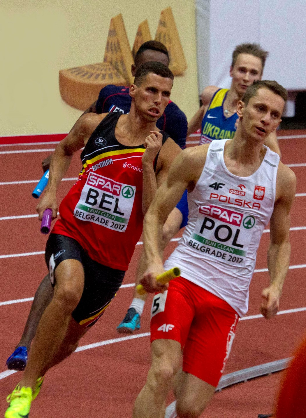 595 4x400 kevin borlee